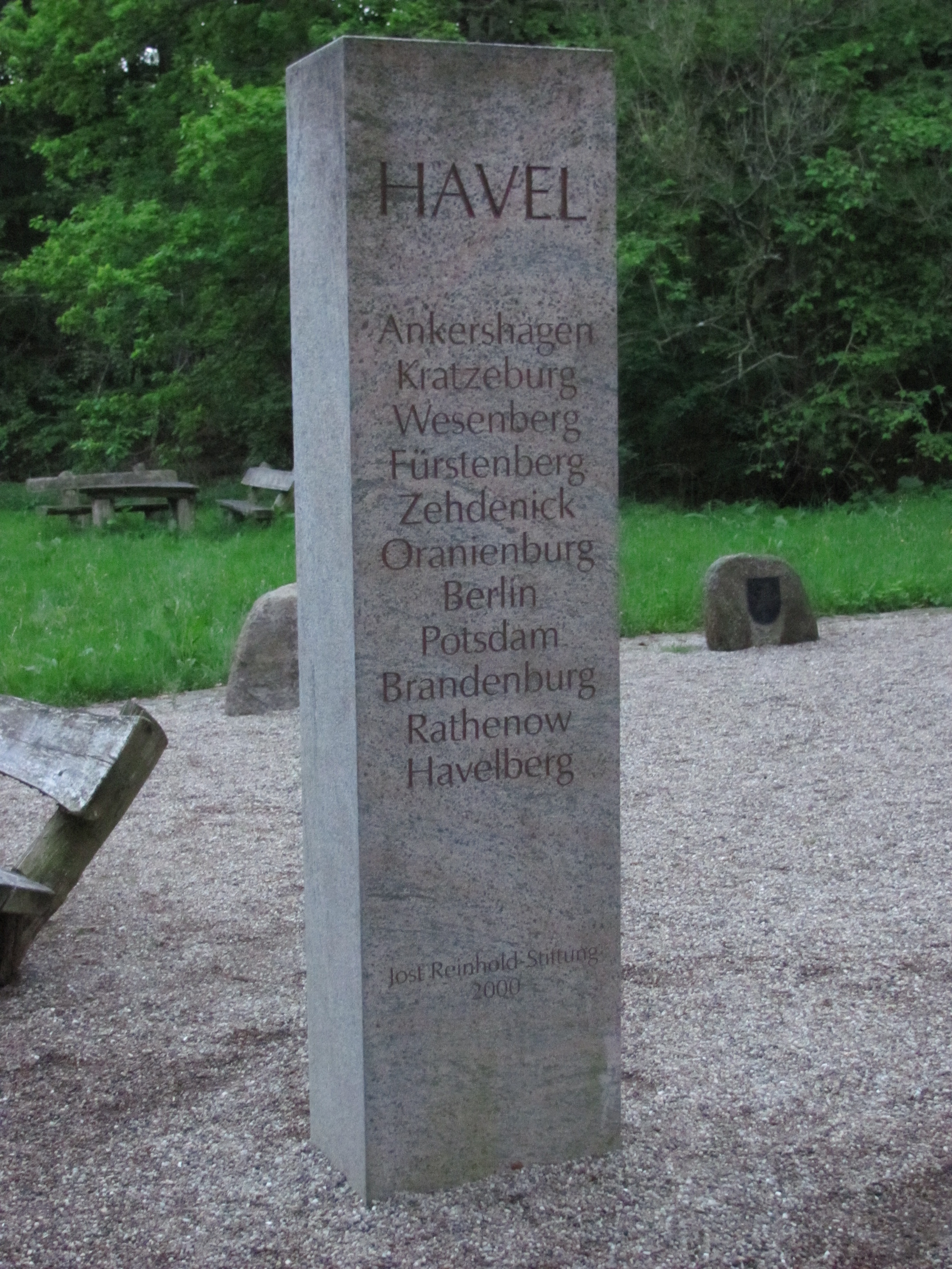 Stele an der Havelquelle bei Ankershagen